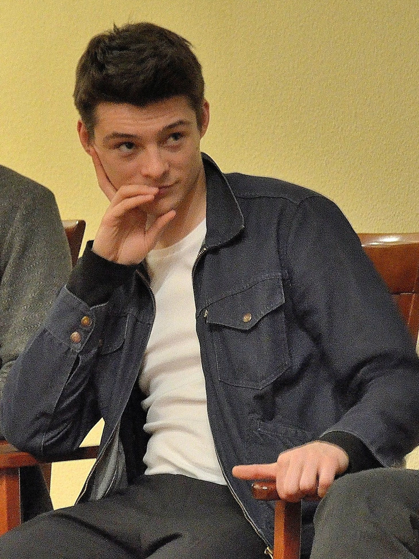 Aktor Tomasz Ziętek podczas spotkania Polskiego Instytutu Sztuki Filmowej z cyklu "Film polski w kulturze narodowej" poświęconego filmowi Kamienie na szaniec. Sejm RP, sala konferencyjna Nowego Domu Poselskiego.